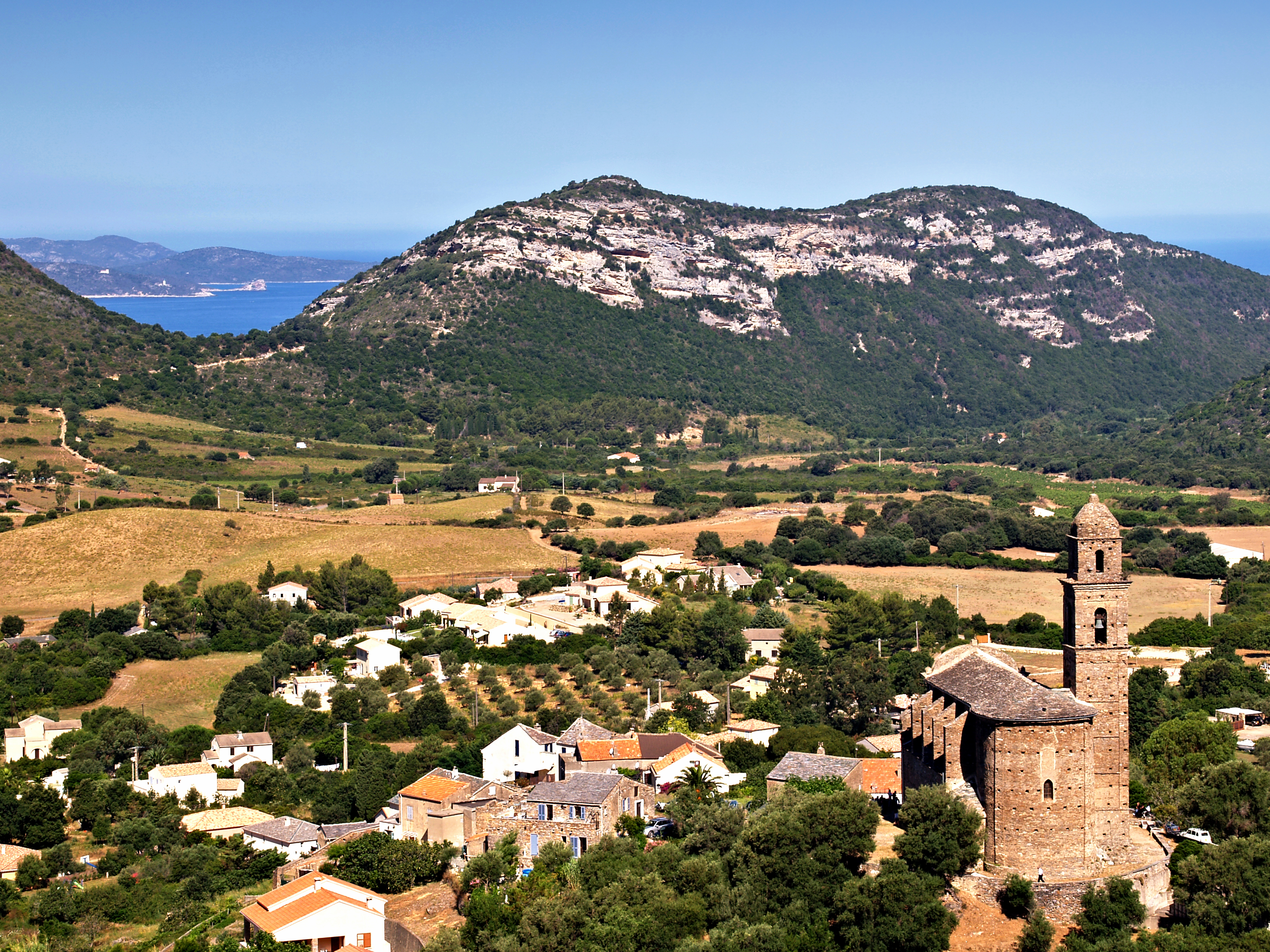 Patrimonio (Corsica) - Vue du village